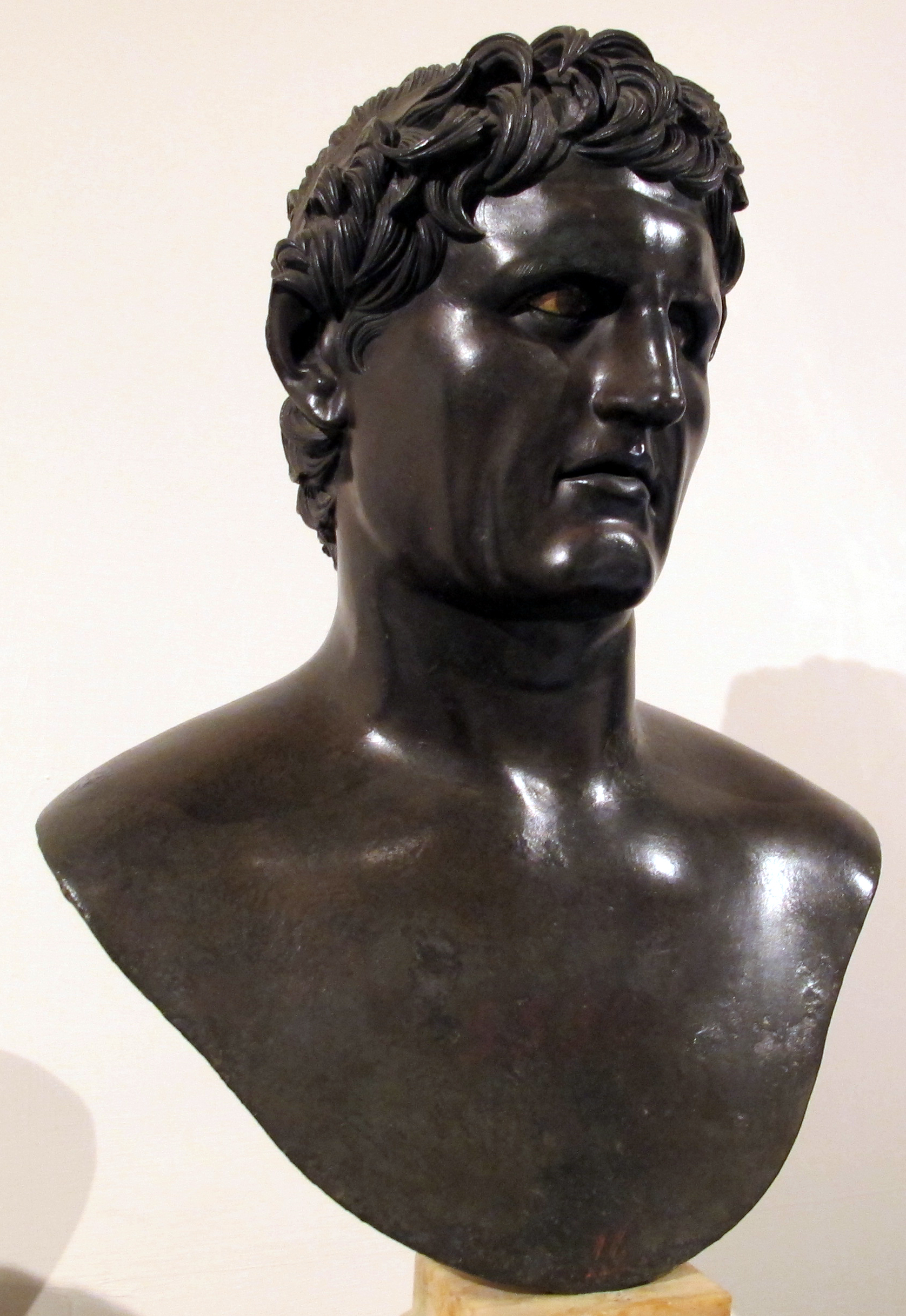 Ancient Roman art from the Villa of the Papyri (Herculaneum)